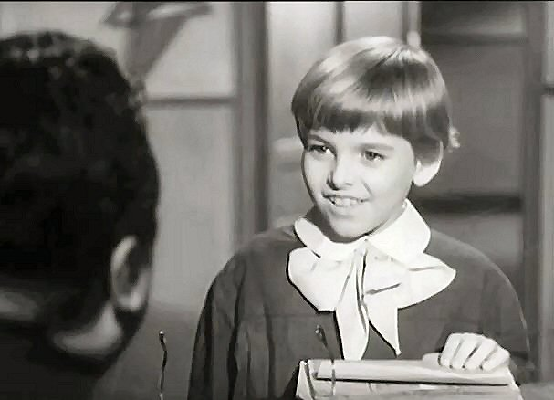 Film Il Maestro di Aldo Fabrizi (1957)